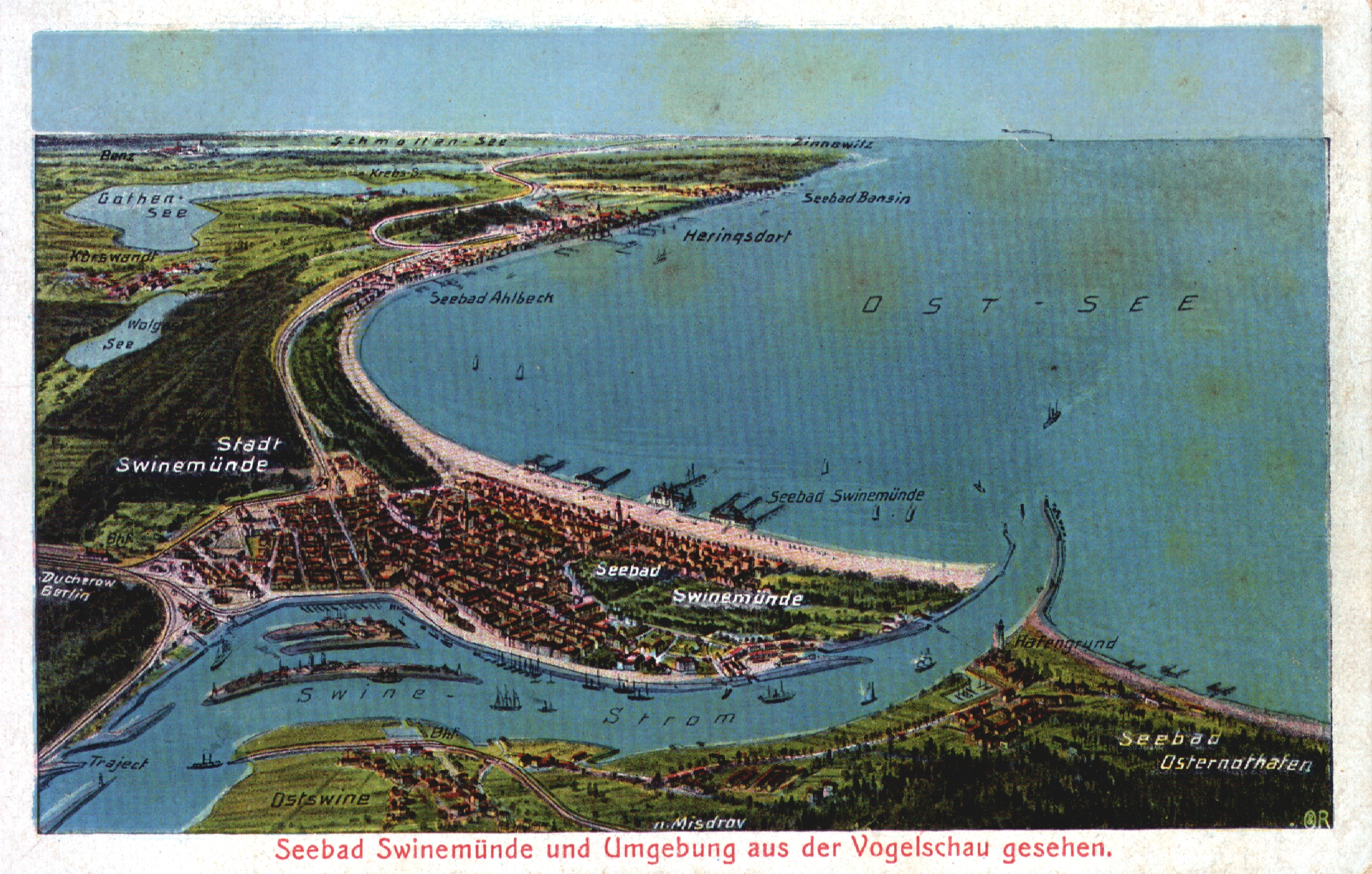 Świnoujście pod koniec XIX wieku.